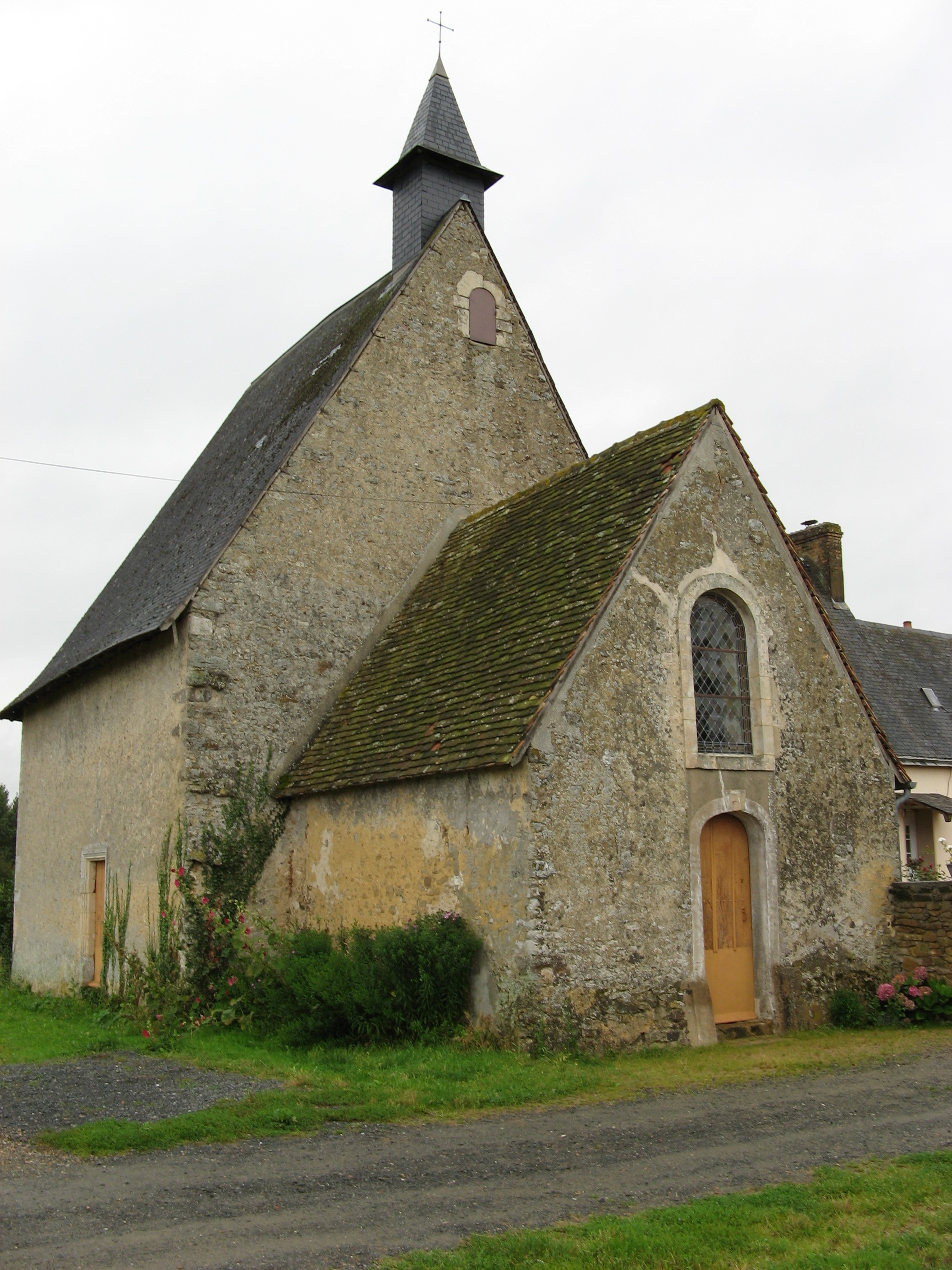 TELOCHE (Sarthe) - Chapelle Notre Dame de l'Epine